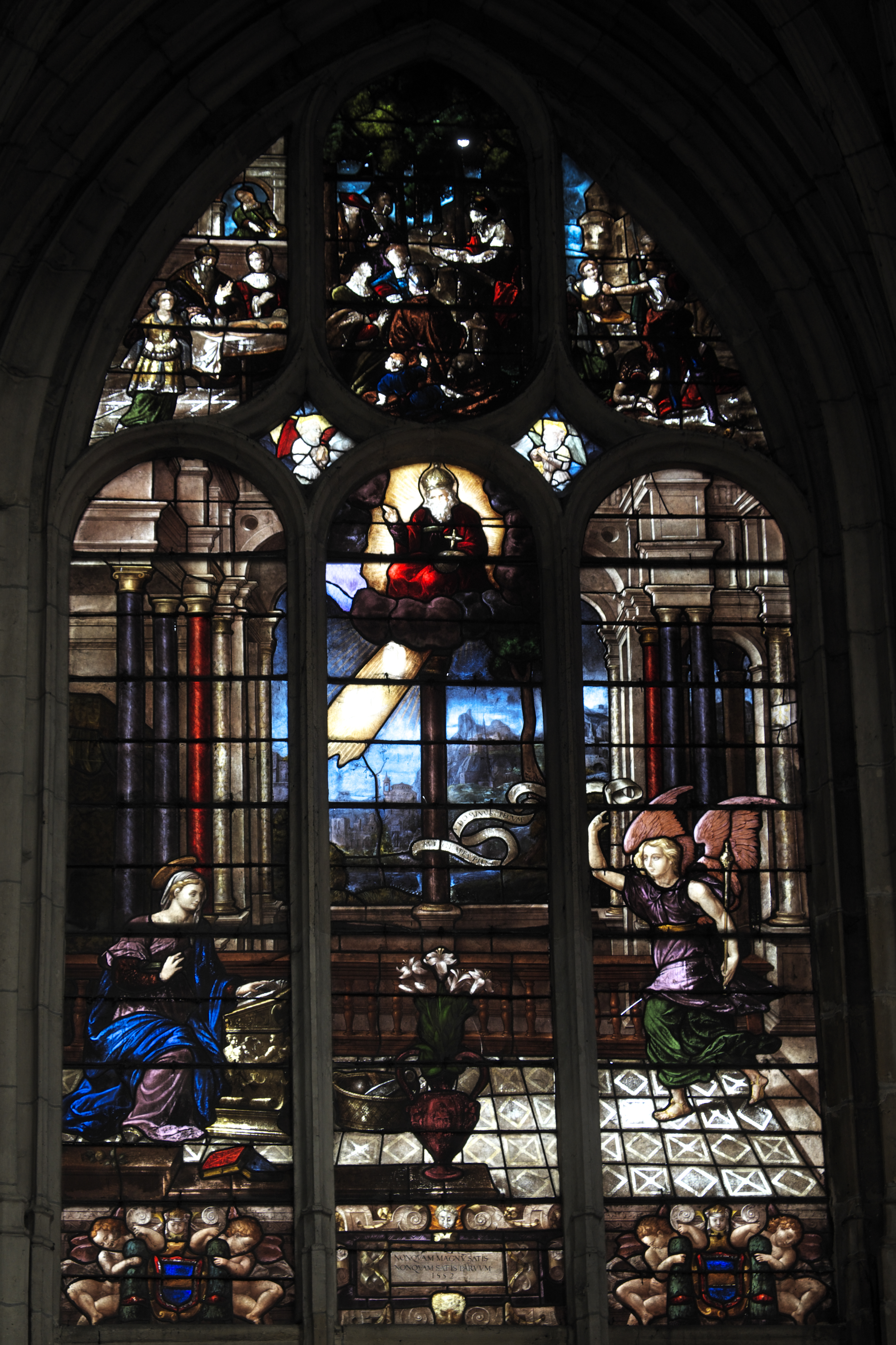 Katholische Kirche Sainte-Foy in Conches-en-Ouche im Département Eure (Haute-Normandie/Frankreich), Bleiglasfenster aus dem 16. Jahrhundert, mit der Jahreszahl 1552, Darstellung: Verkündigung